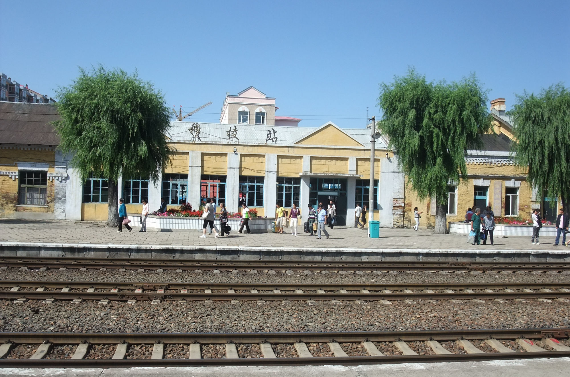 黑龙江省穆棱站